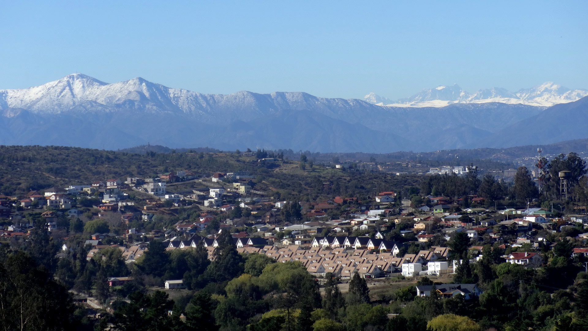 Ciudad de Quilpué, junio de 2014.